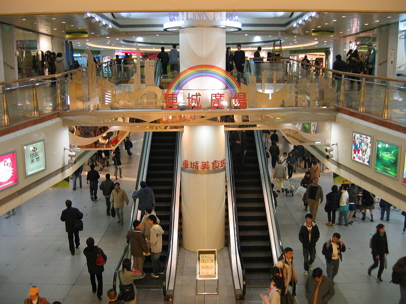 CitylinkPlaza